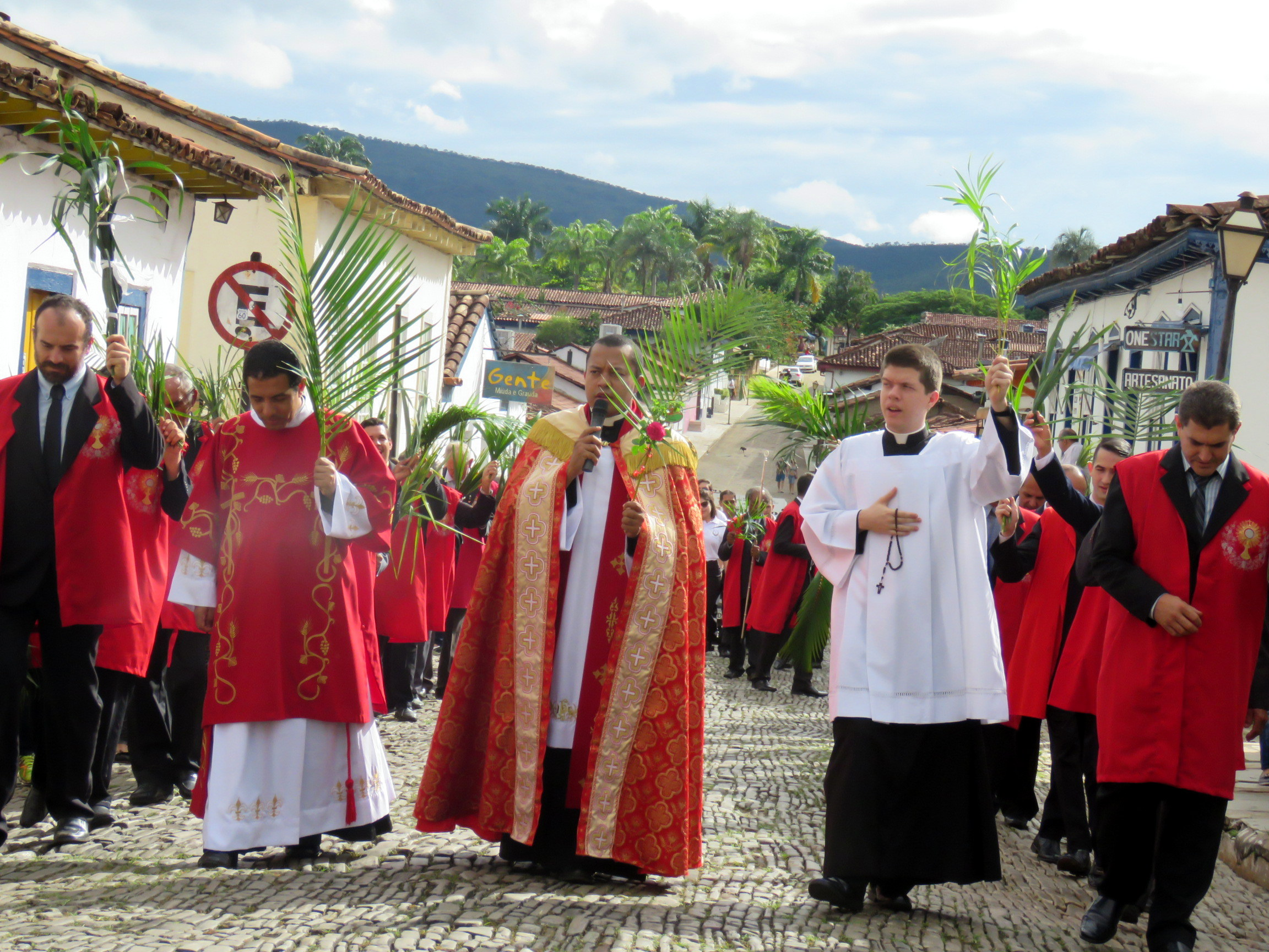 Procissão de Ramos realizada pela Irmandade do Santíssimo Sacramento na manhã de domingo de Ramos em 2018